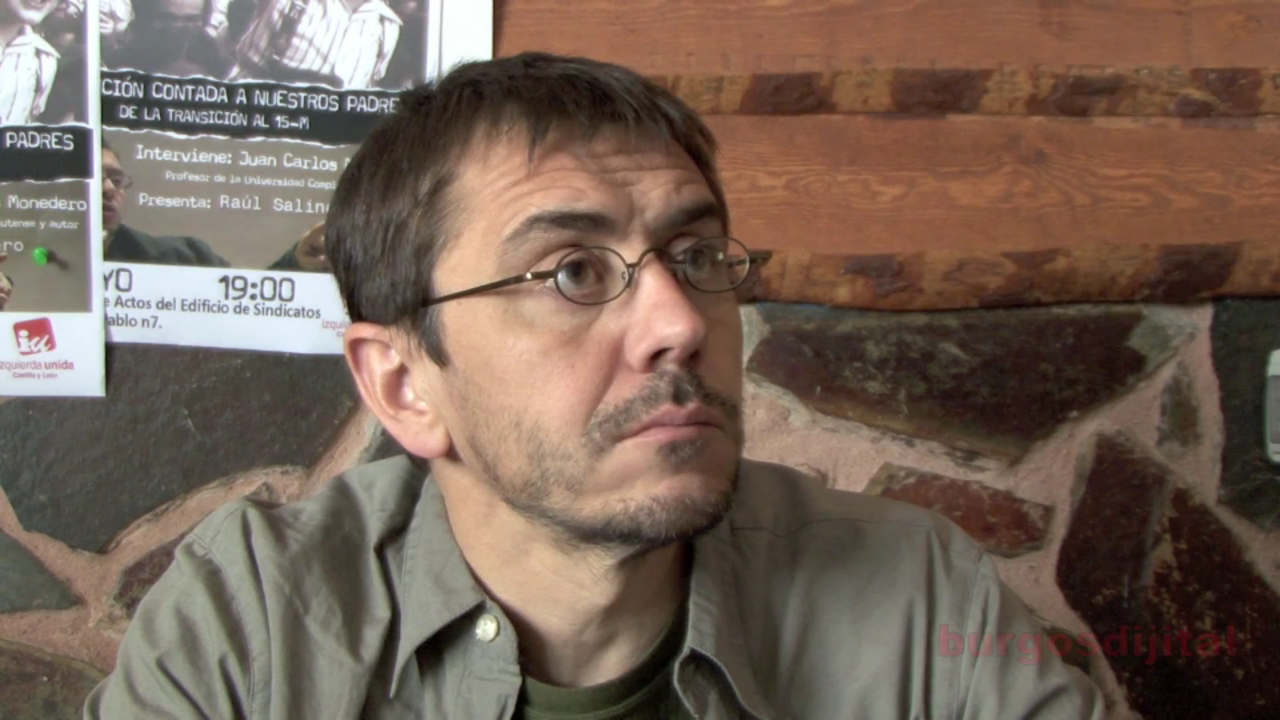 Juan Carlos Monedero, politólogo español.